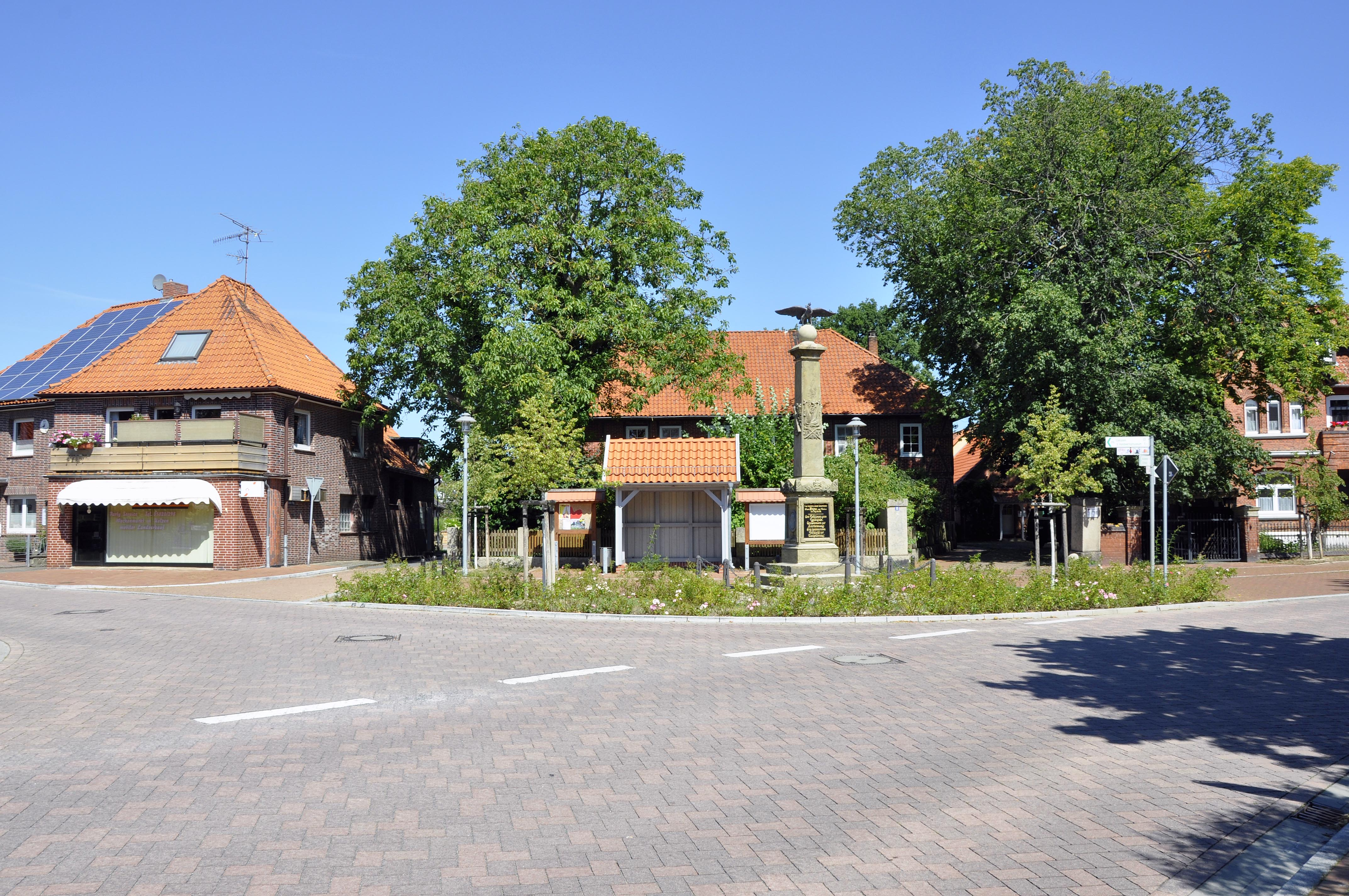 Suhlendorf, alter Marktplatz, August 2020